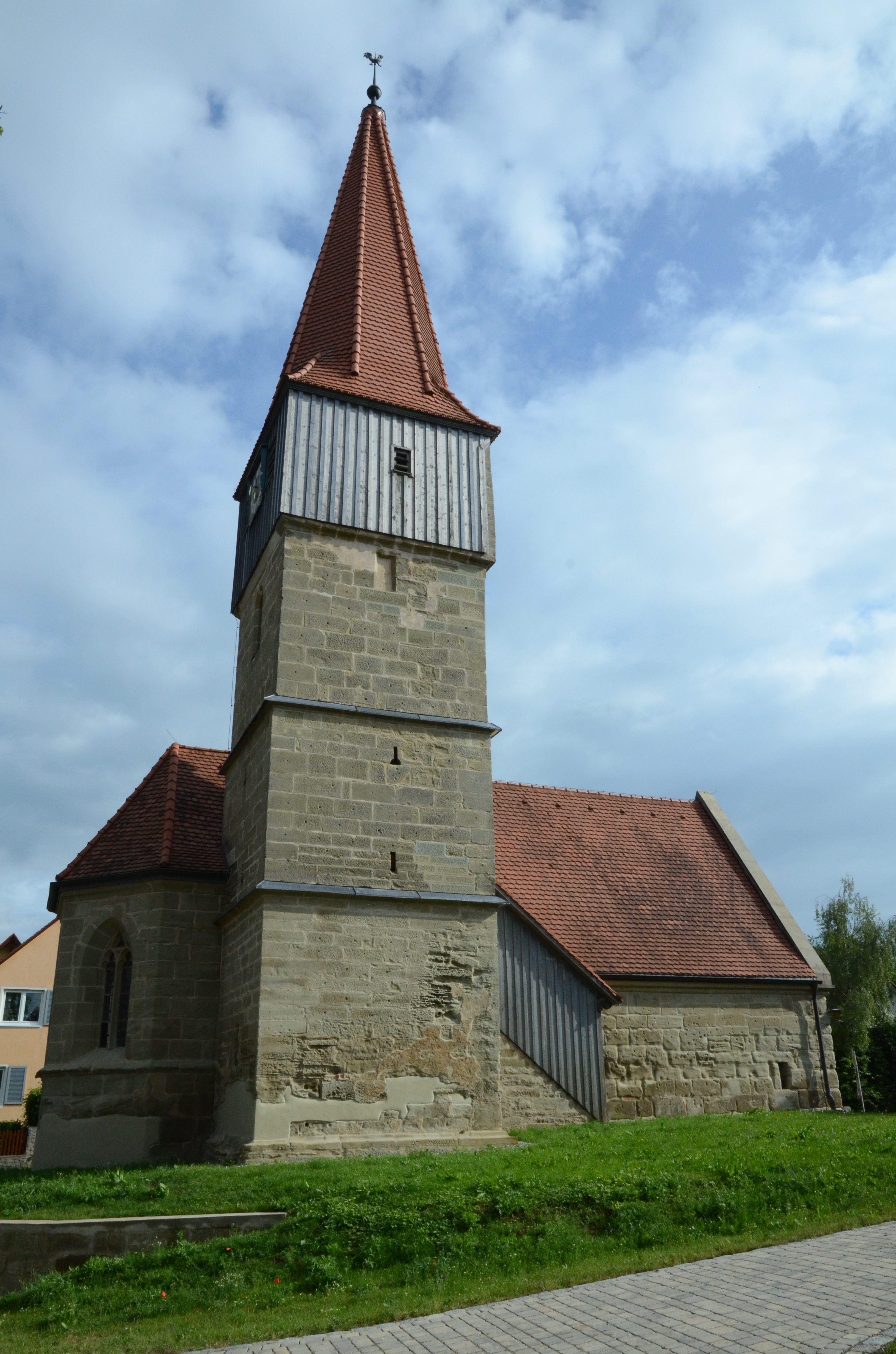 evang.-luth. Kapelle St. Stephanus in Ergersheim